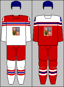 Czech Republic national team jerseys from World Championships 2015-2018